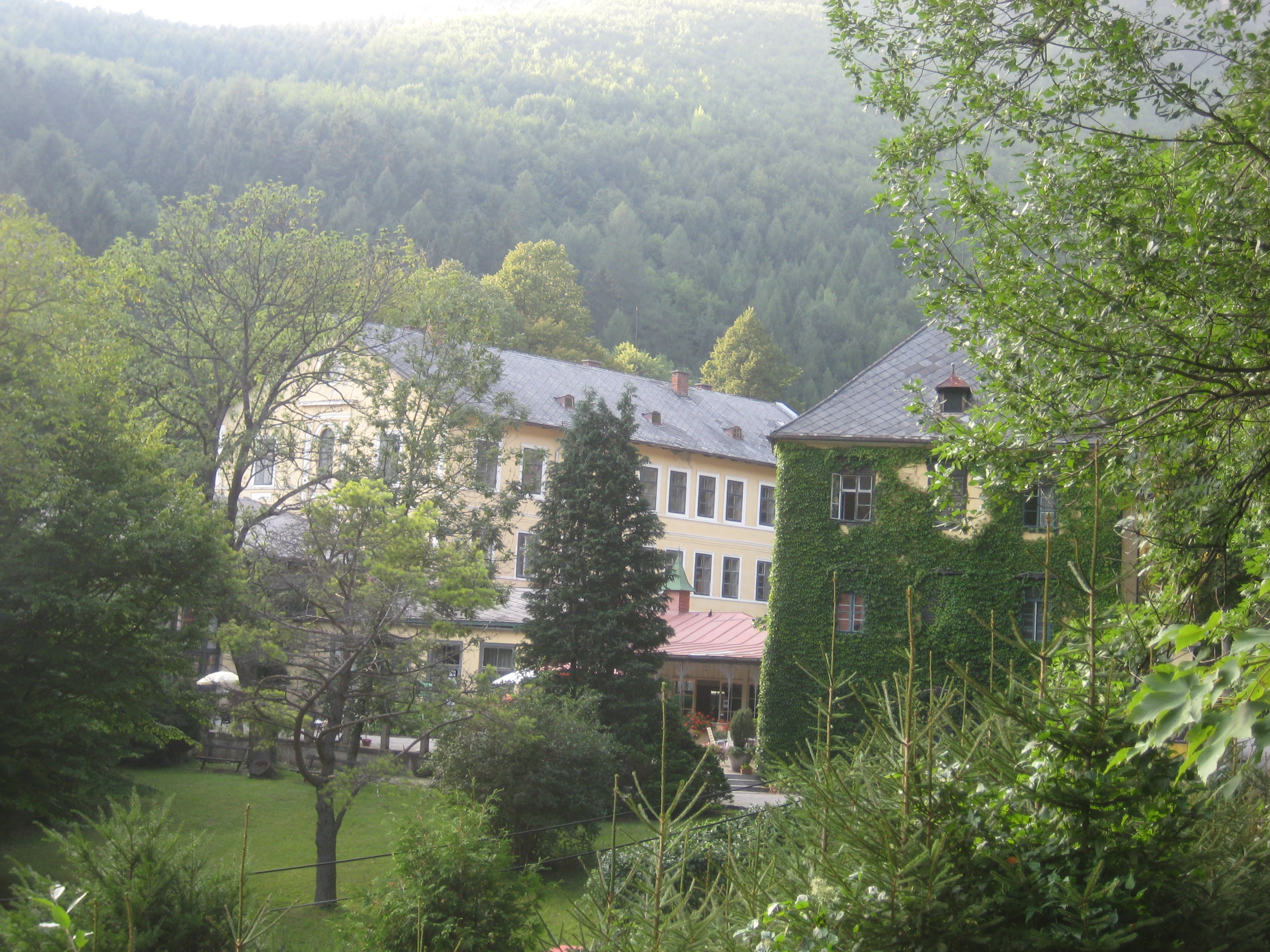 Kurhaus Thalhof in Reichenau an der Rax (Niederösterreich) (Teilansicht), von einem öffentlich zugänglichen Waldweg aus fotografiert. Eine Tafel an einem der Gebäude trägt folgende Aufschrift: „Thalhof Der älteste Nachweis des damaligen Bauerngutes Thalhof fand sich 1652. Erstmals wurde das Tavernrecht 1785 erteilt und 1823 erneuert. Danach war der Thalhof in wenigen Jahren zu einer der bekanntesten Gaststätten des Ostalpenraumes geworden. Durch weitere Jahrzehnte zu einem hervorragenden Hotelbetrieb ausgebaut, verkehrten hier Kaiser Franz Josef I., Kaiserin Elisabeth, viele Angehörige des Kaiserhauses, sowie Künstler, Dichter und zahlreiche andere bedeutende Menschen. Heute wird das traditionsreiche Hotel als Kurhaus geführt.“